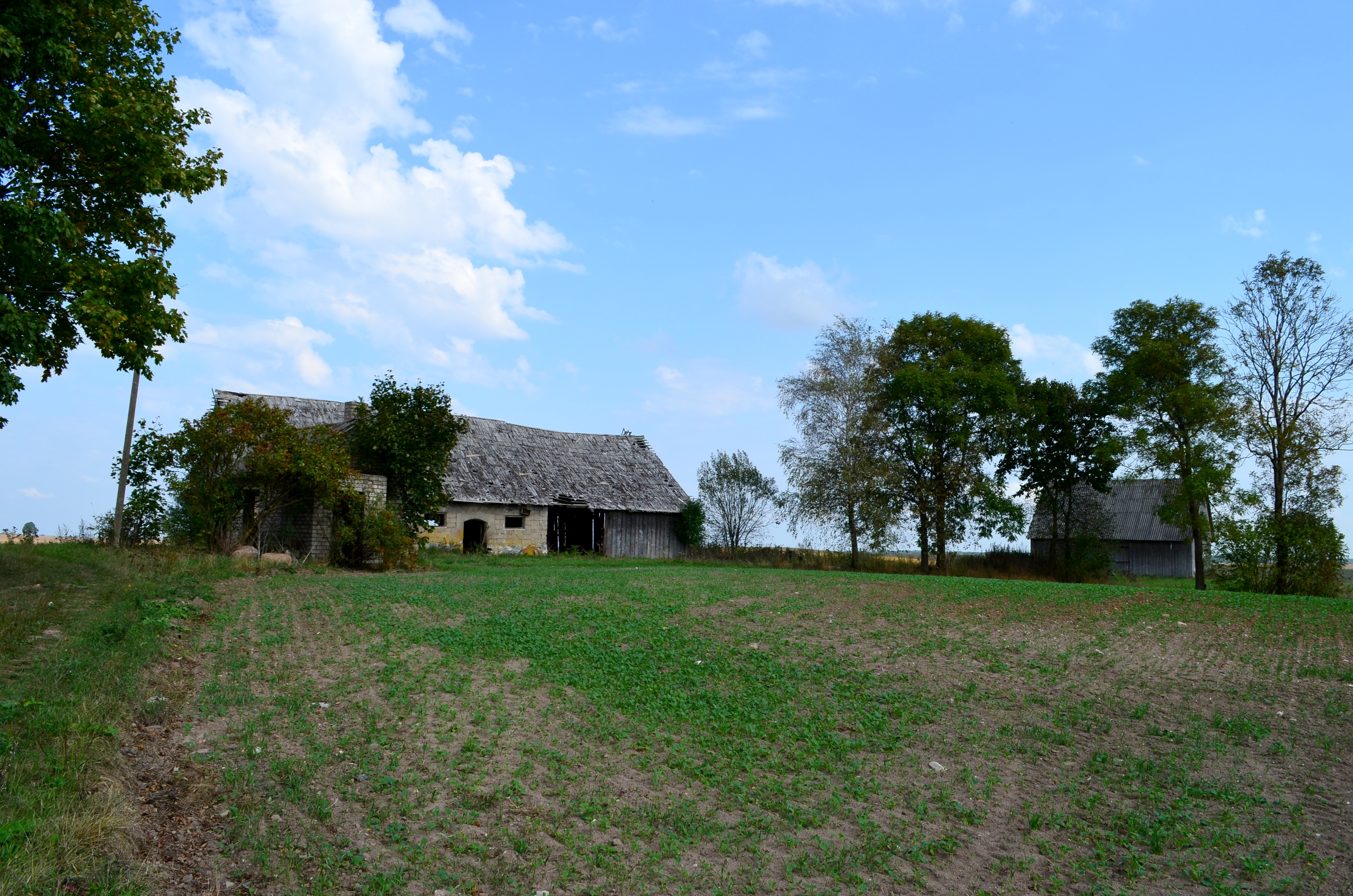 Vantainiai, Kėdainių raj.